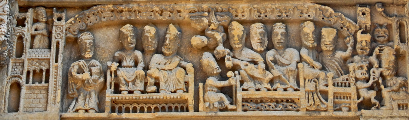 Linteau du Portail Ouest de l'église de Saint Hilaire-en-Brionnais (Détail d'une photo de Jochen Jahnke)